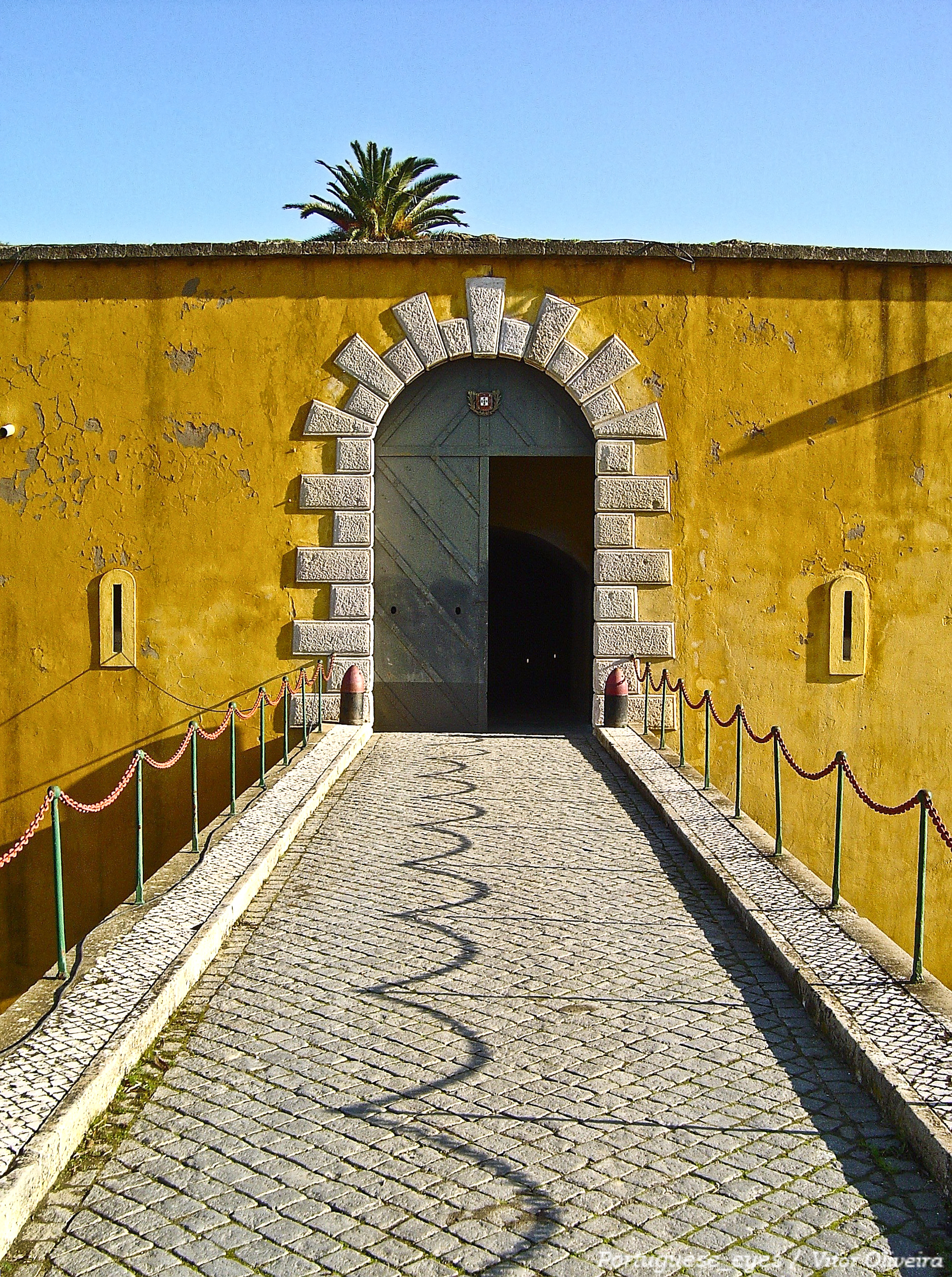 Em 1859 o plano de defesa da cidade de Lisboa assentou na preparação de área para campo de batalha, na organização de defesa da cidade, construção de linha defensiva na margem esquerda do Tejo (Forte de Sacavém), e defesa da barra. Em 1869 pretendeu-se reforçar a eficácia defensiva através de uma linha a passar na foz do rio Sacavém, vale de Odivelas e serra de Monsanto, apoiando o Forte de Almada e posições adjacentes, com o Forte de S. Julião da Barra como limite. Em 1872 iniciam-se os estudos para a construção do reduto de Monte Sintra, sob a direcção de Sá da Bandeira. A 17 de Agosto de 1875 ano foi iniciada a construção do forte e em 1892 concluída. Em 1939 entregou-se o Reduto à Direcção de Arma de Artilharia e foi destinado apenas a paiol de munições de infantaria, ficando sob a juridisção do DGMG a partir daquele ano até cerca de 1992. Em 1998 procedeu-se à cessão definitiva e onerosa da parte extramuros à Câmara Municipal de Loures. A partir de 1999, a Direcção-Geral de Edifícios e Monumentos Nacionais instalou ali os seus Serviços de Arquivo e de Inventário.